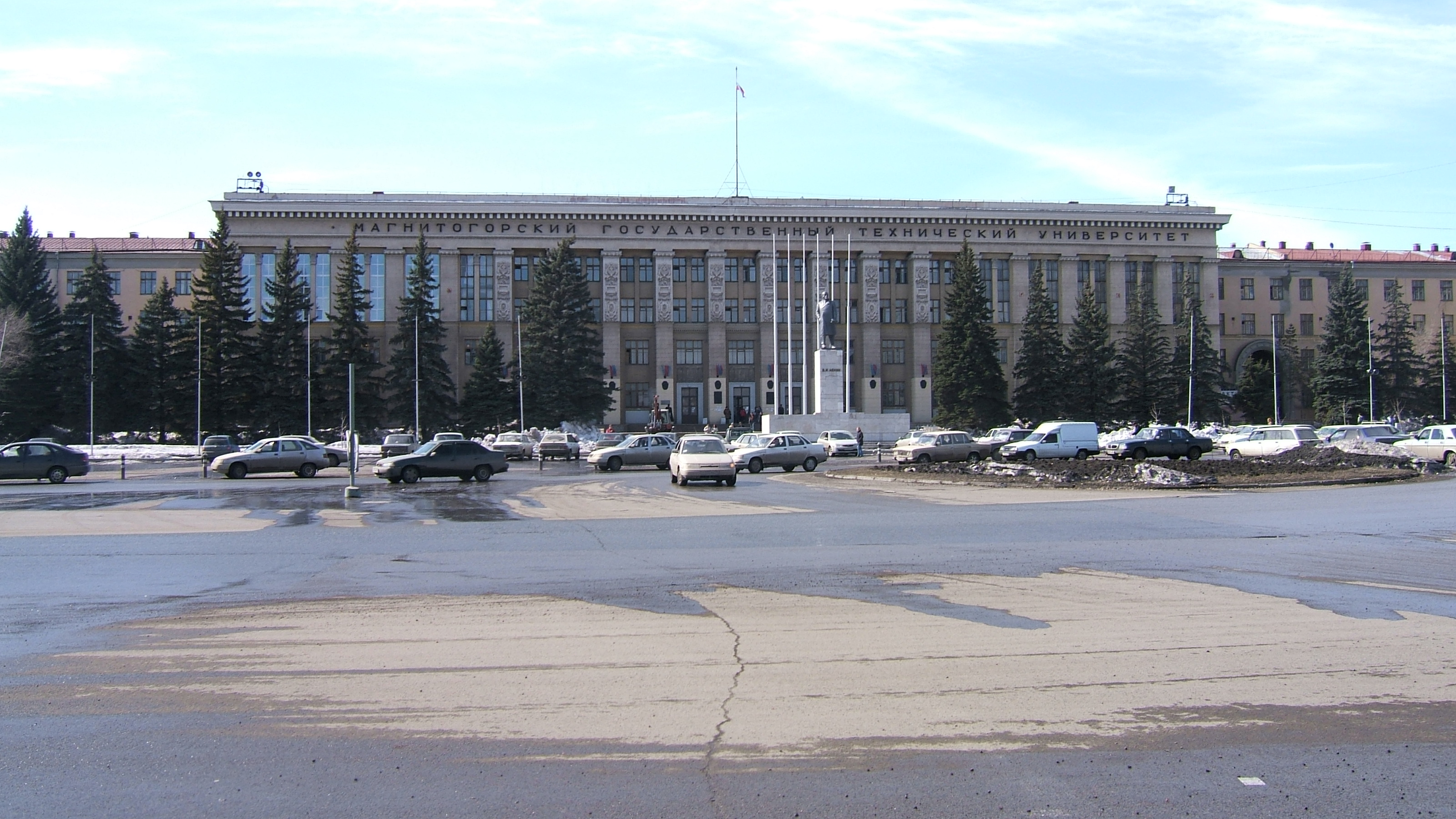 Магнитогорский государственный технический университет